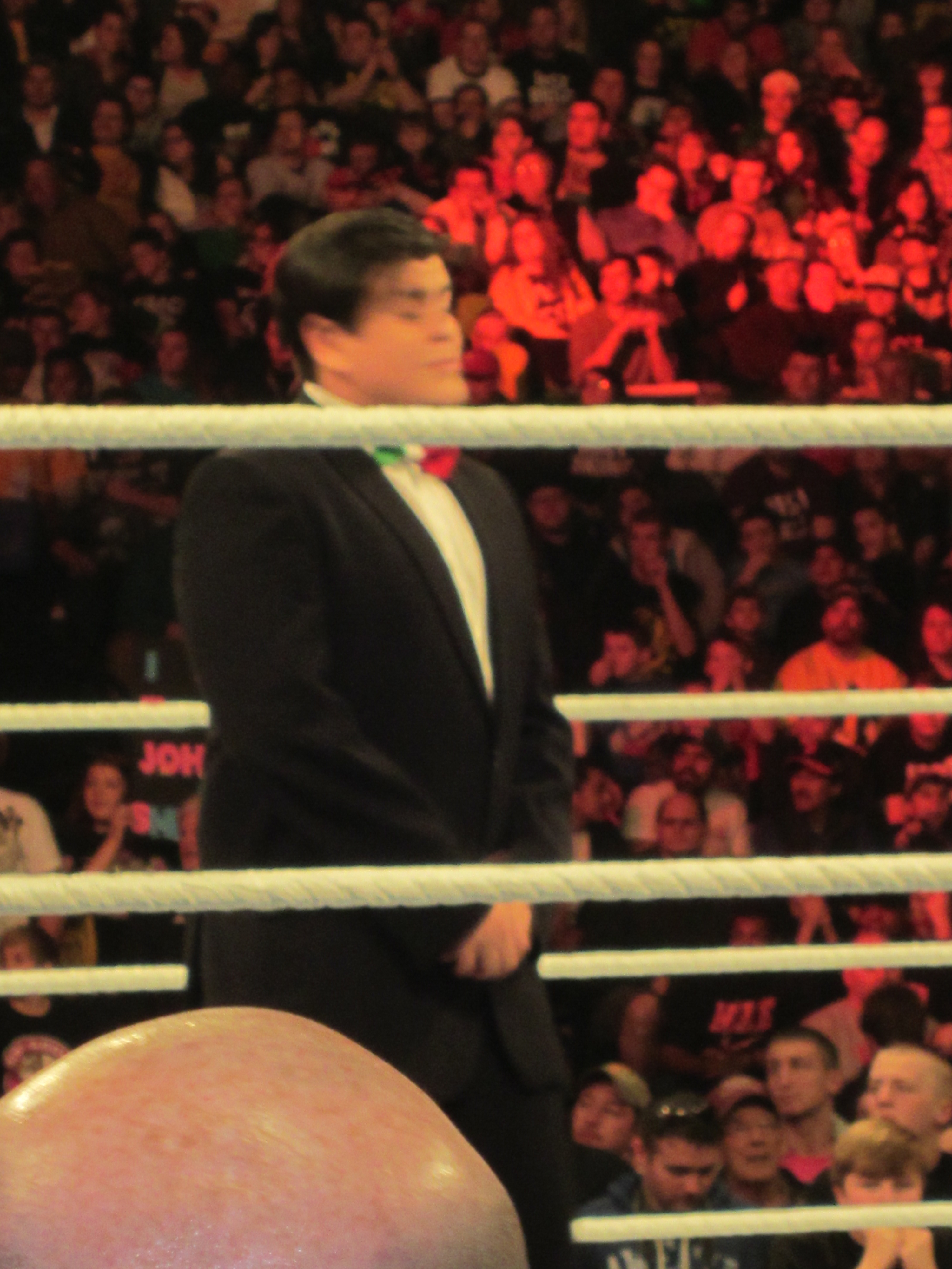 Ricardo Rodriguez